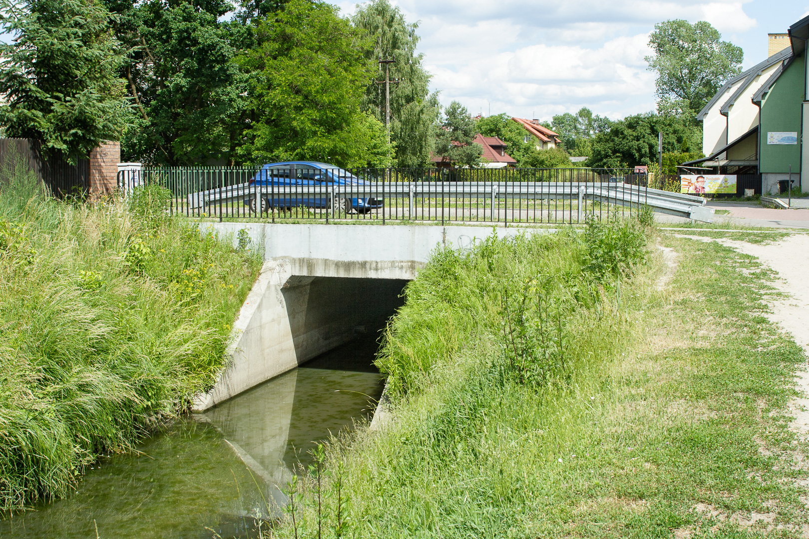 Kanał Wawerski - przepust pod ulicą Diamentową. Stara Miłosna, Wesoła, Warszawa.